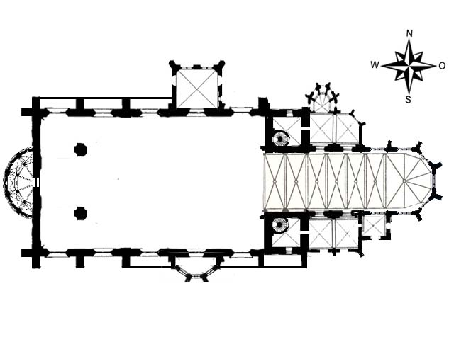 Půdorys katedrály Svatého Petra a Pavla v Brně.